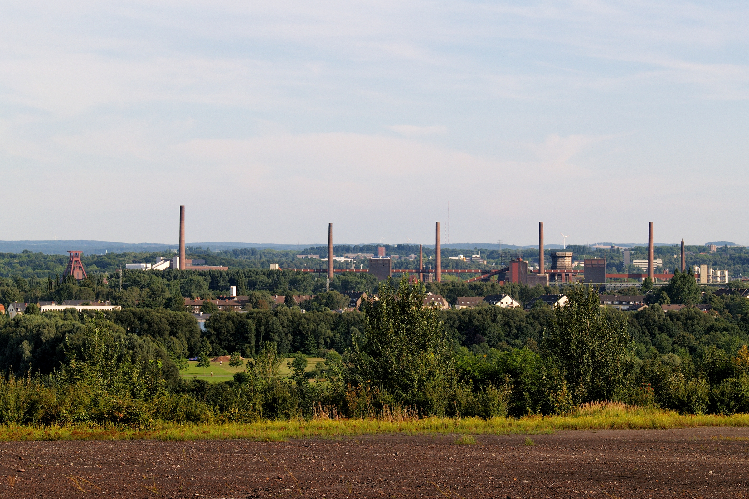 Die Kokerei Zollverein von der Schurenbachhalde aus gesehen